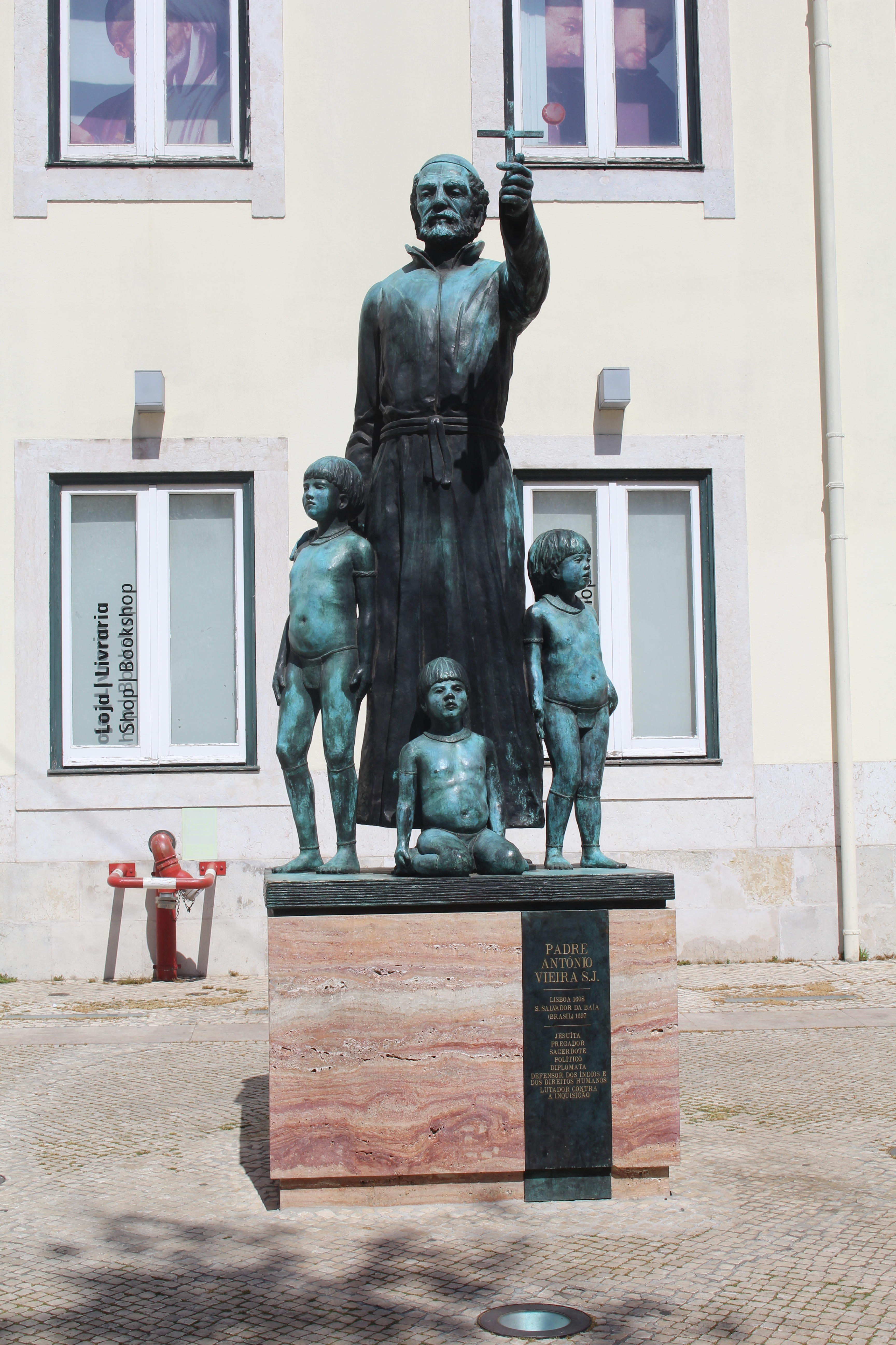 Statue du père António Vieira, Lisbonne.